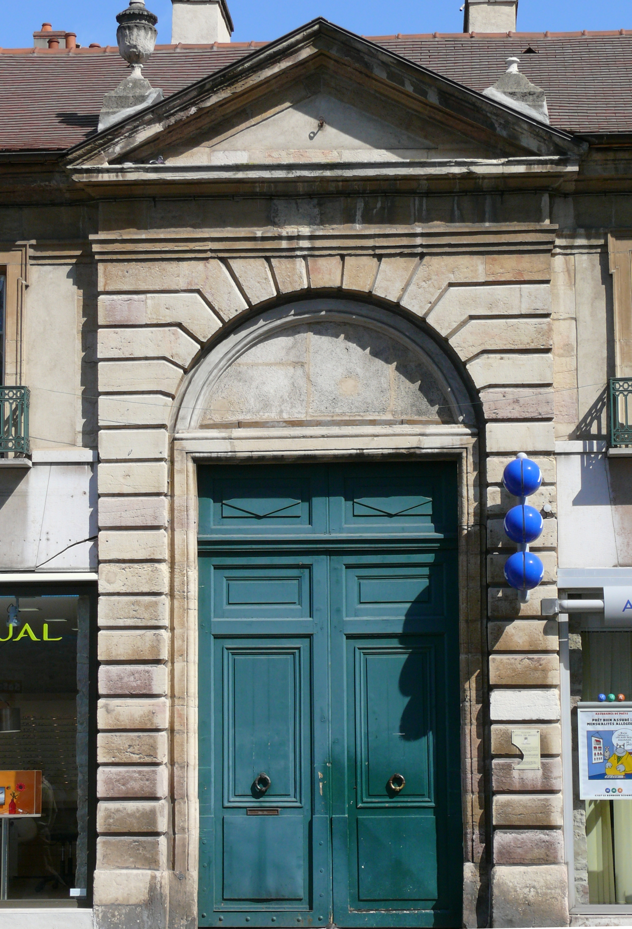 Dijon - Hôtel de Migieu - Portail